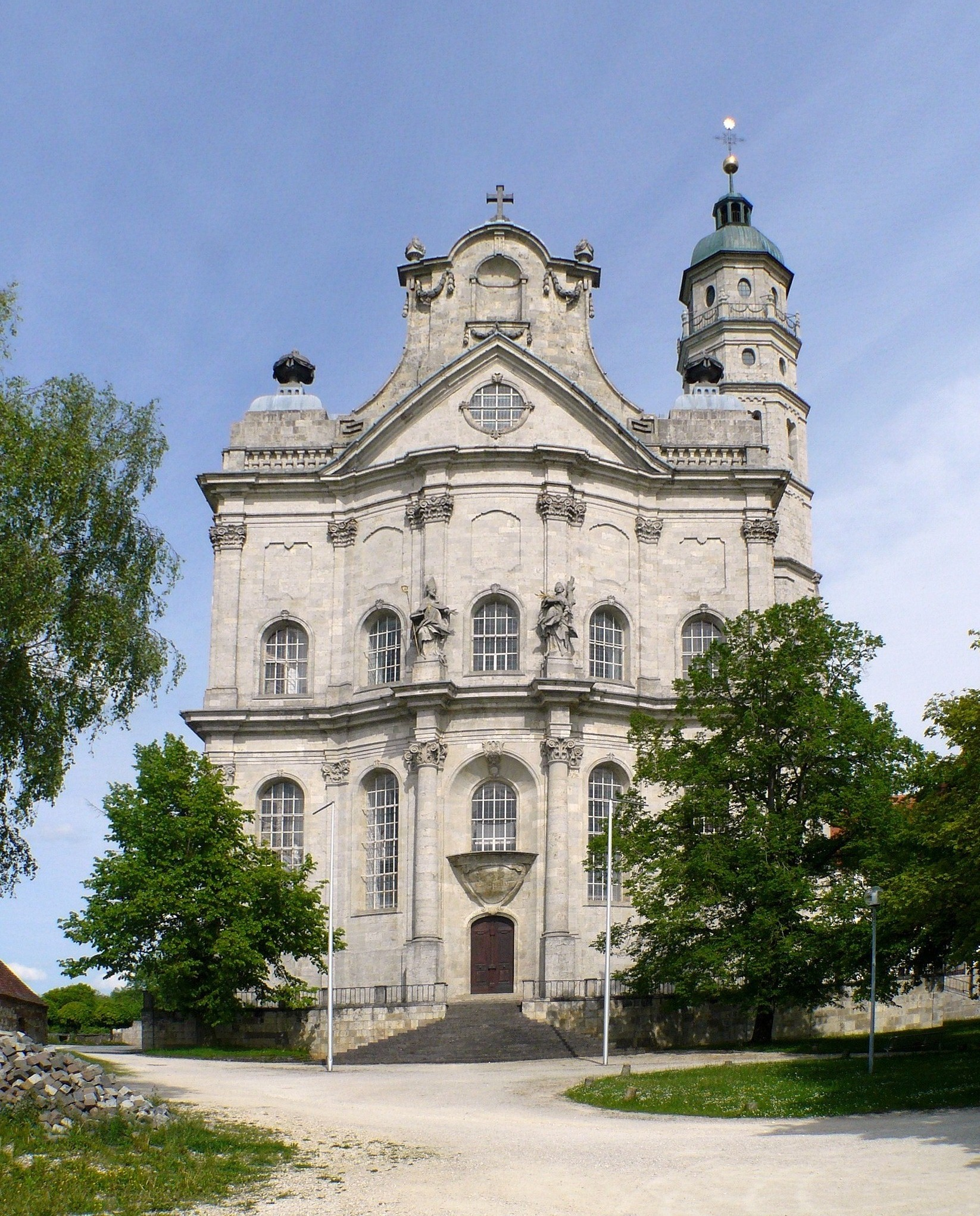 Westansicht der Abteikirche Neresheim